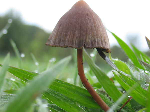 Psilocybe mexicana - Jalisco, Mexico